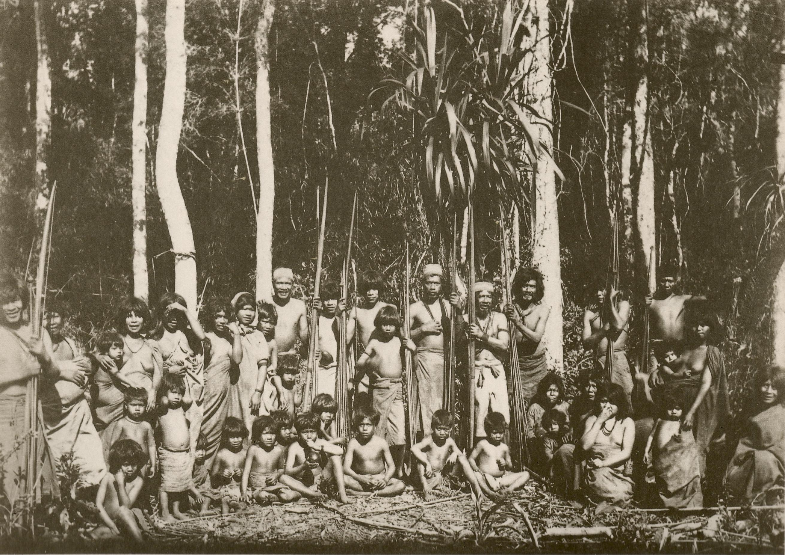 Índios Caiúquas na província do Paraná, c.1860.